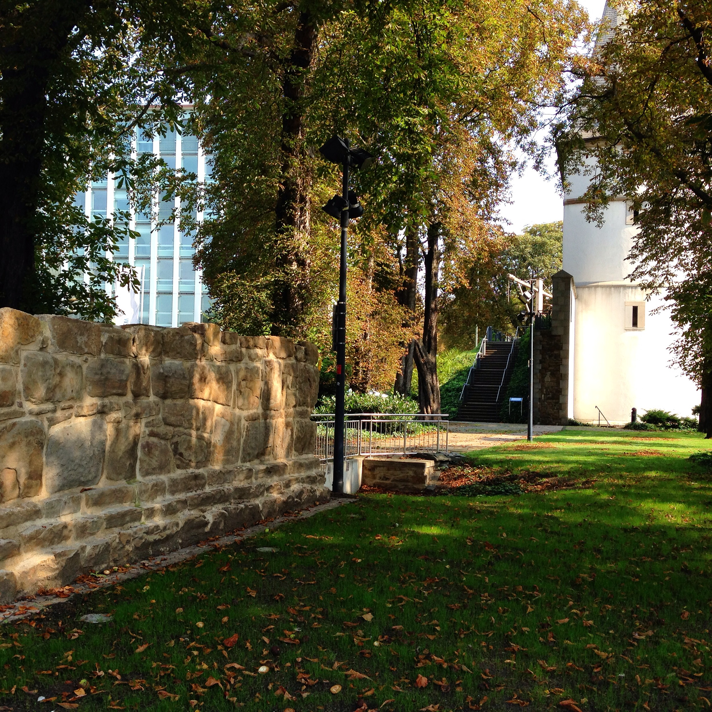 Stadtmauer und Adlerturm als Reste der mittelalterlichen Stadtbefestigung This is a photograph of an archaeological site. 0002